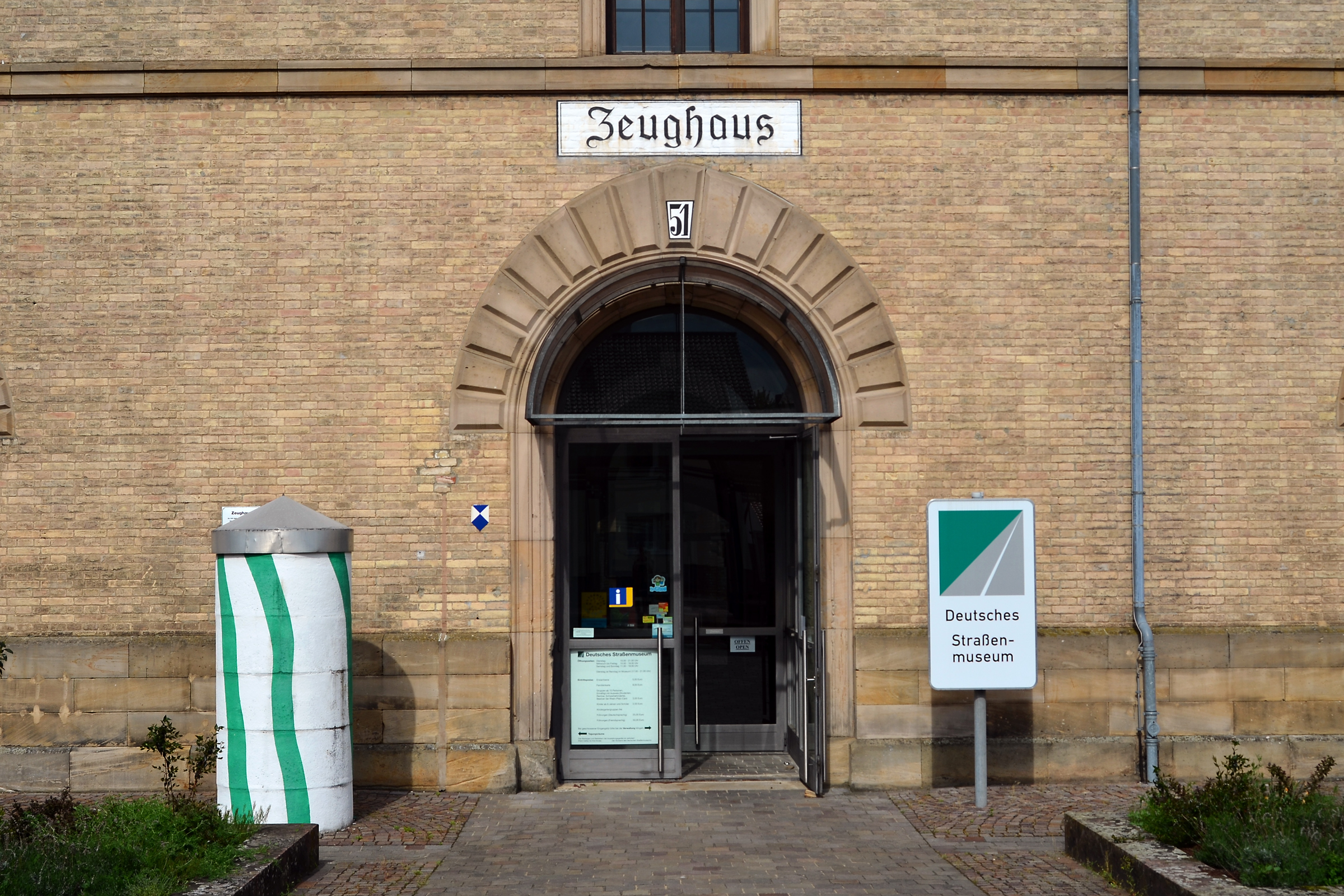 Germersheim, Zeughaus